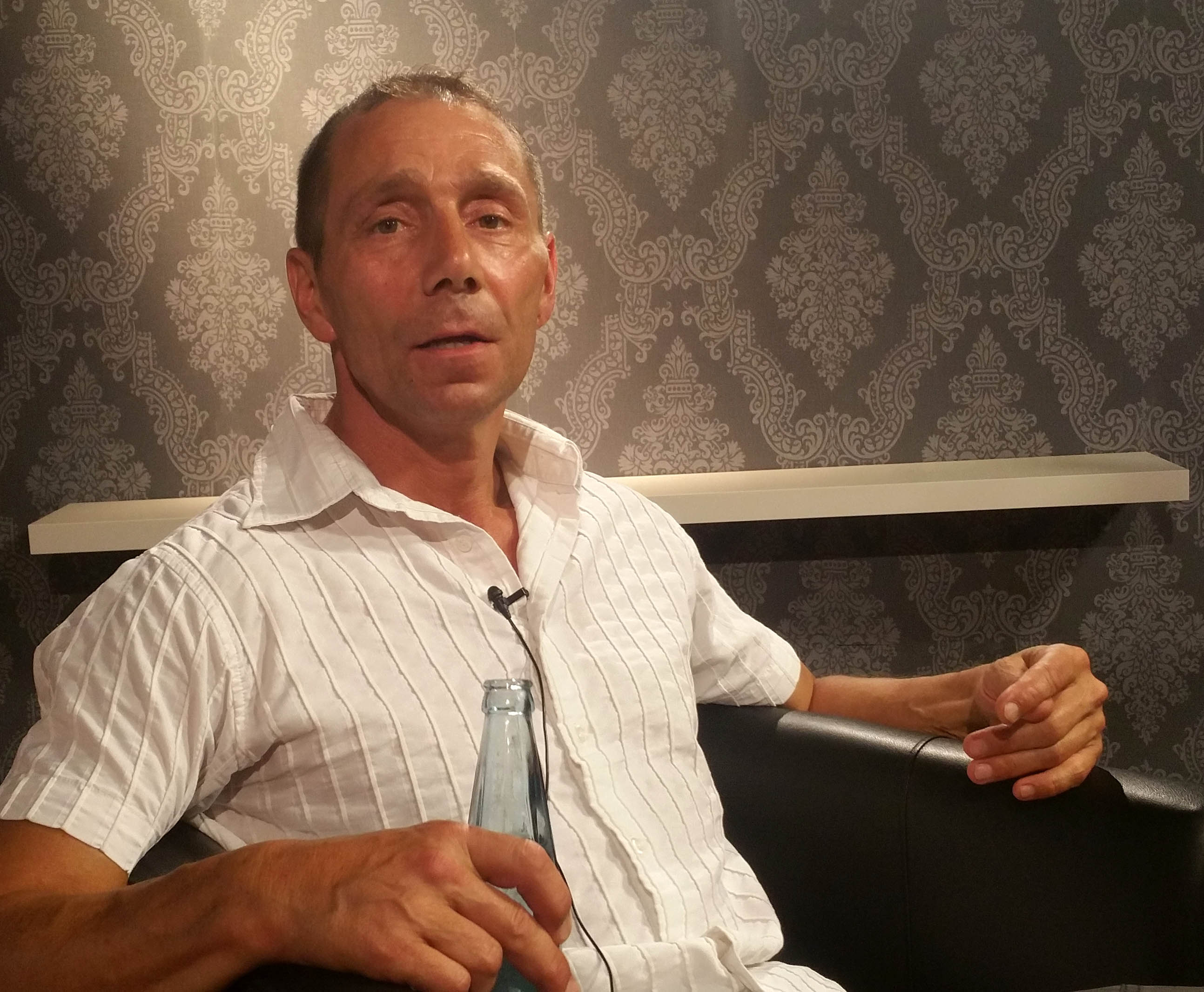 Markus Krüger im Interview beim Podcast 'Sprechplanet'